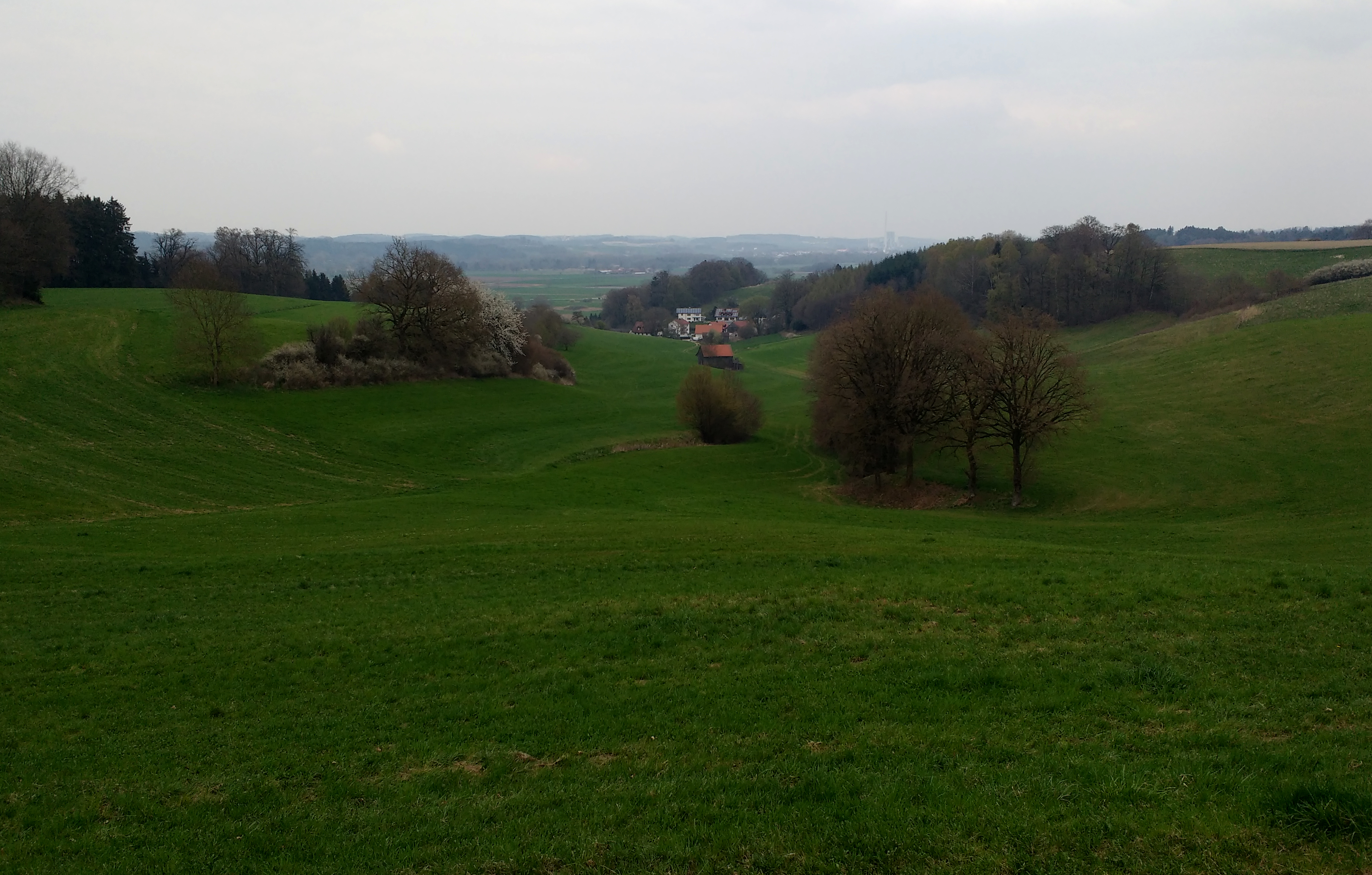 Der Freisinger Ortsteil Garten